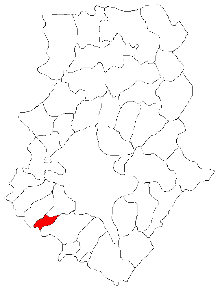 Categorie:Hărţi ale judeţului Ilfov